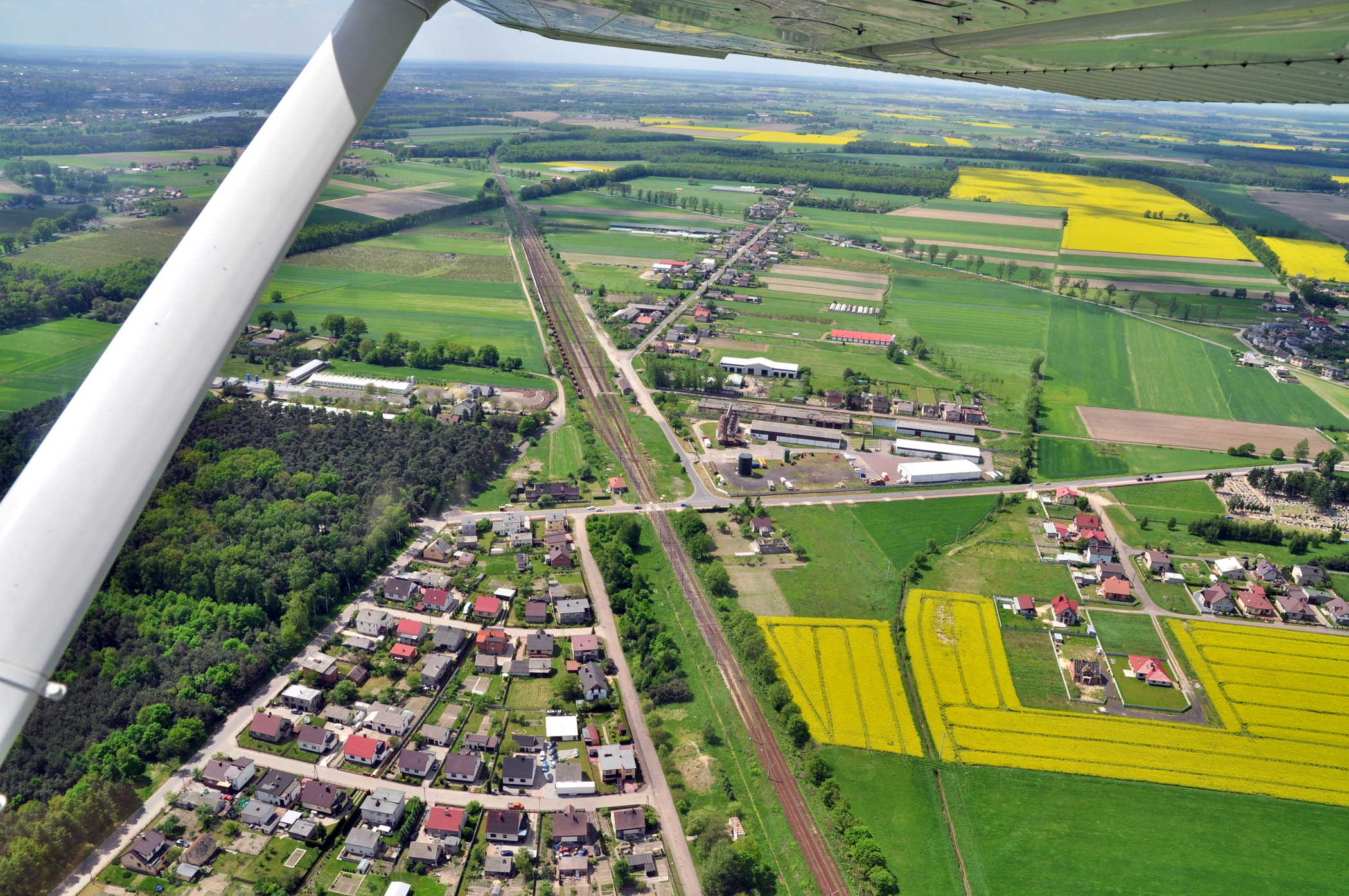 Czekanów, Lewków i Kołątajew w gminie Ostrów Wlkp., przy linii kolejowej nr 14